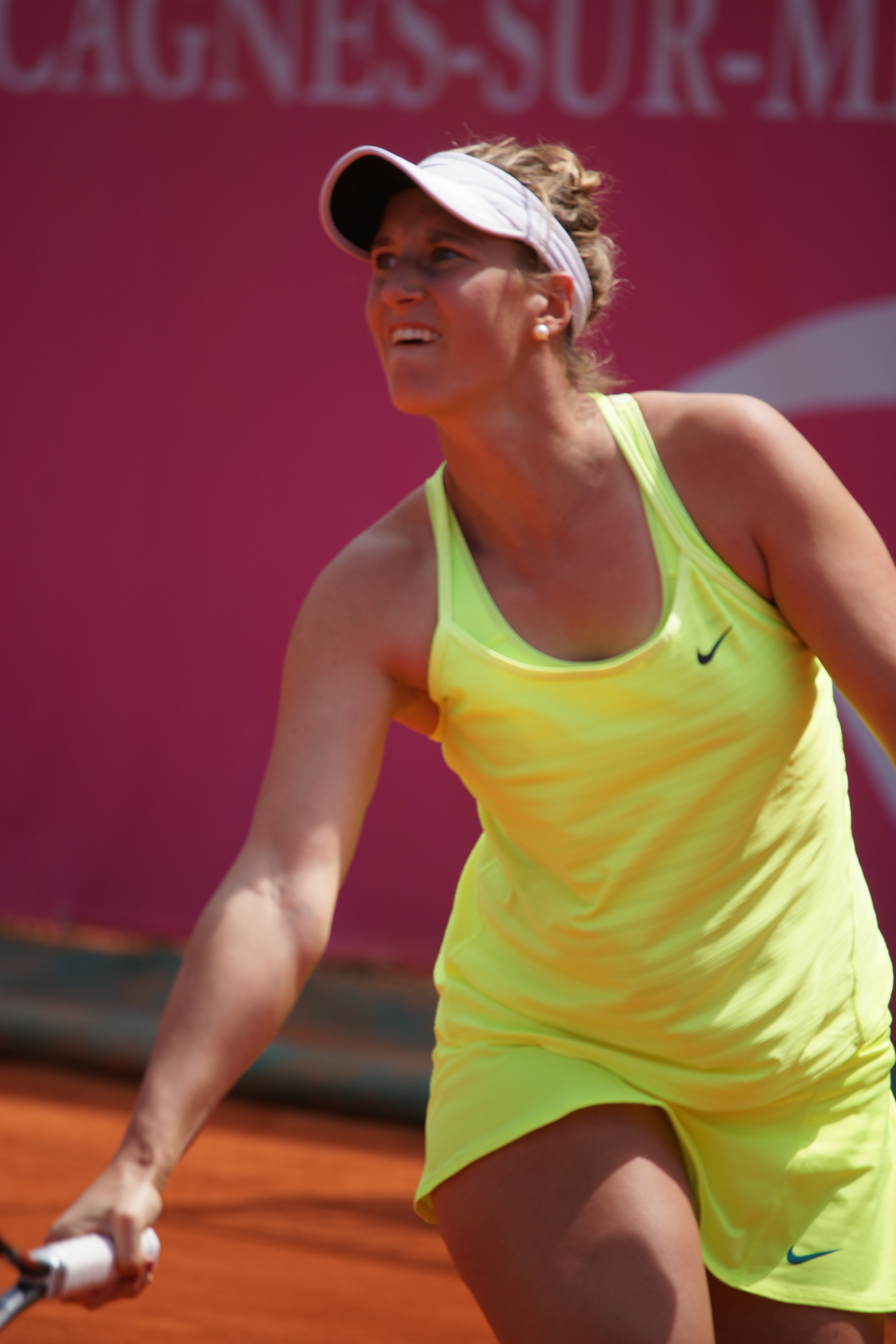 Kim-Alice Grajdek Open ITF Cagnes 2016